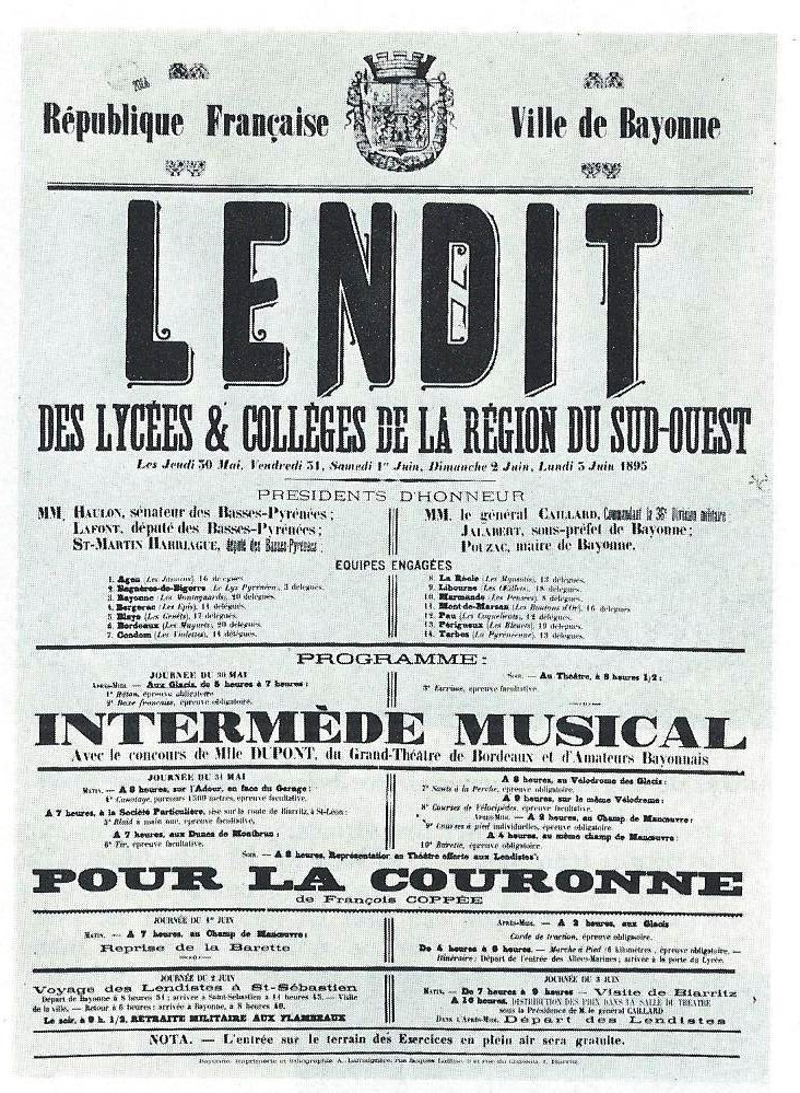 Affiche datant de 1895